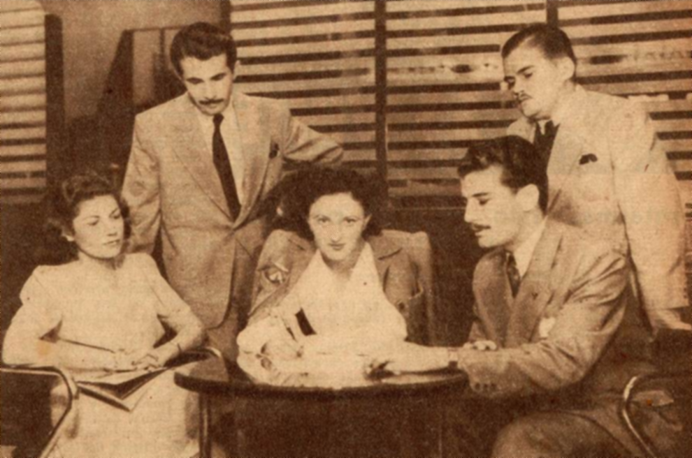 A atriz brasileira, Ida Gomes (1923-2009), em 1943, assina um contrato de exclusividade com uma ótica, junto ao também ator Leandro Montenegro, com quem fazia par romântico em novelas radiofônicas.